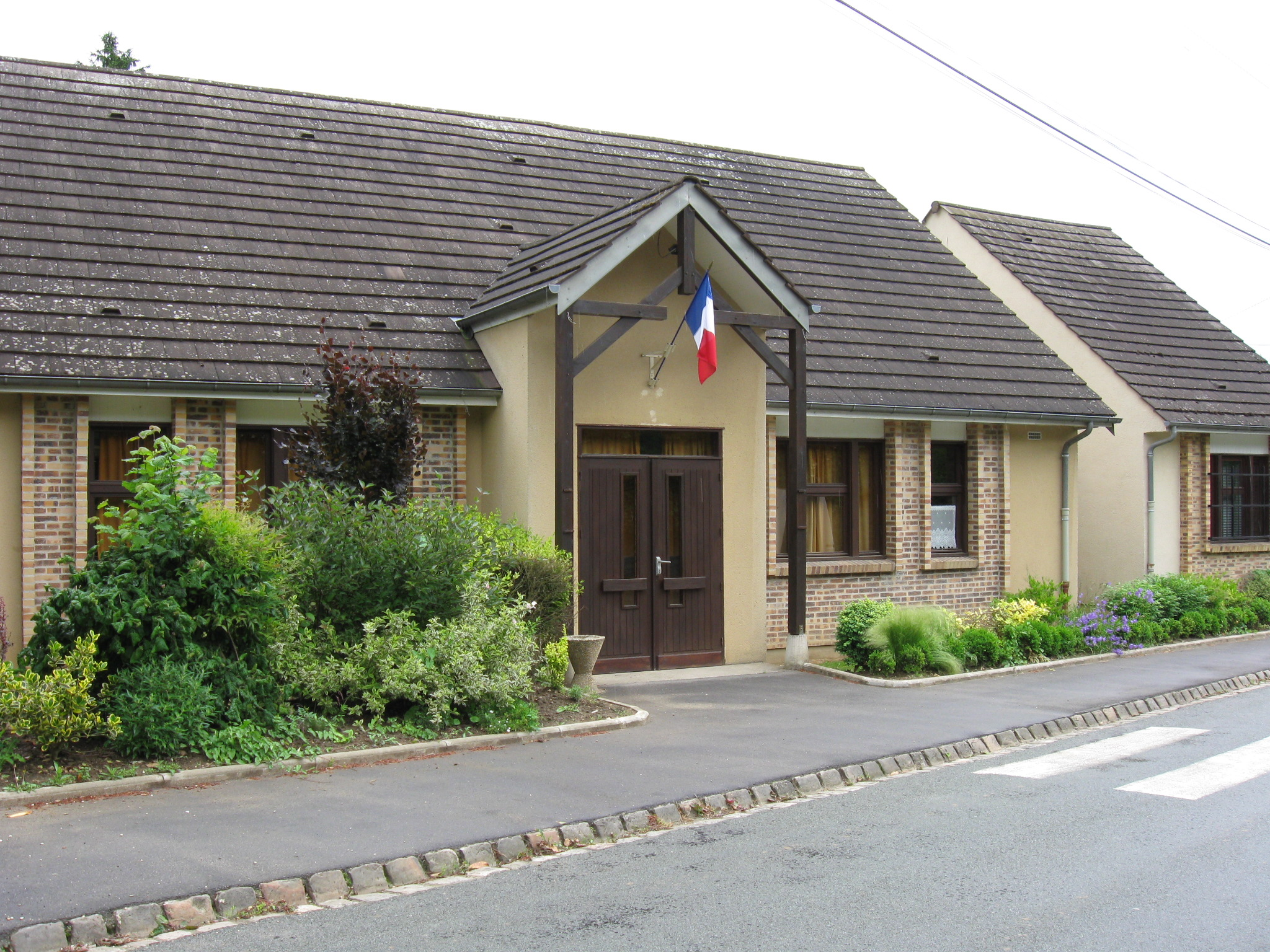 Mairie de Varinfroy. (département de l'Oise, région Picardie).